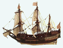 Bremische Pinasse vor 1700